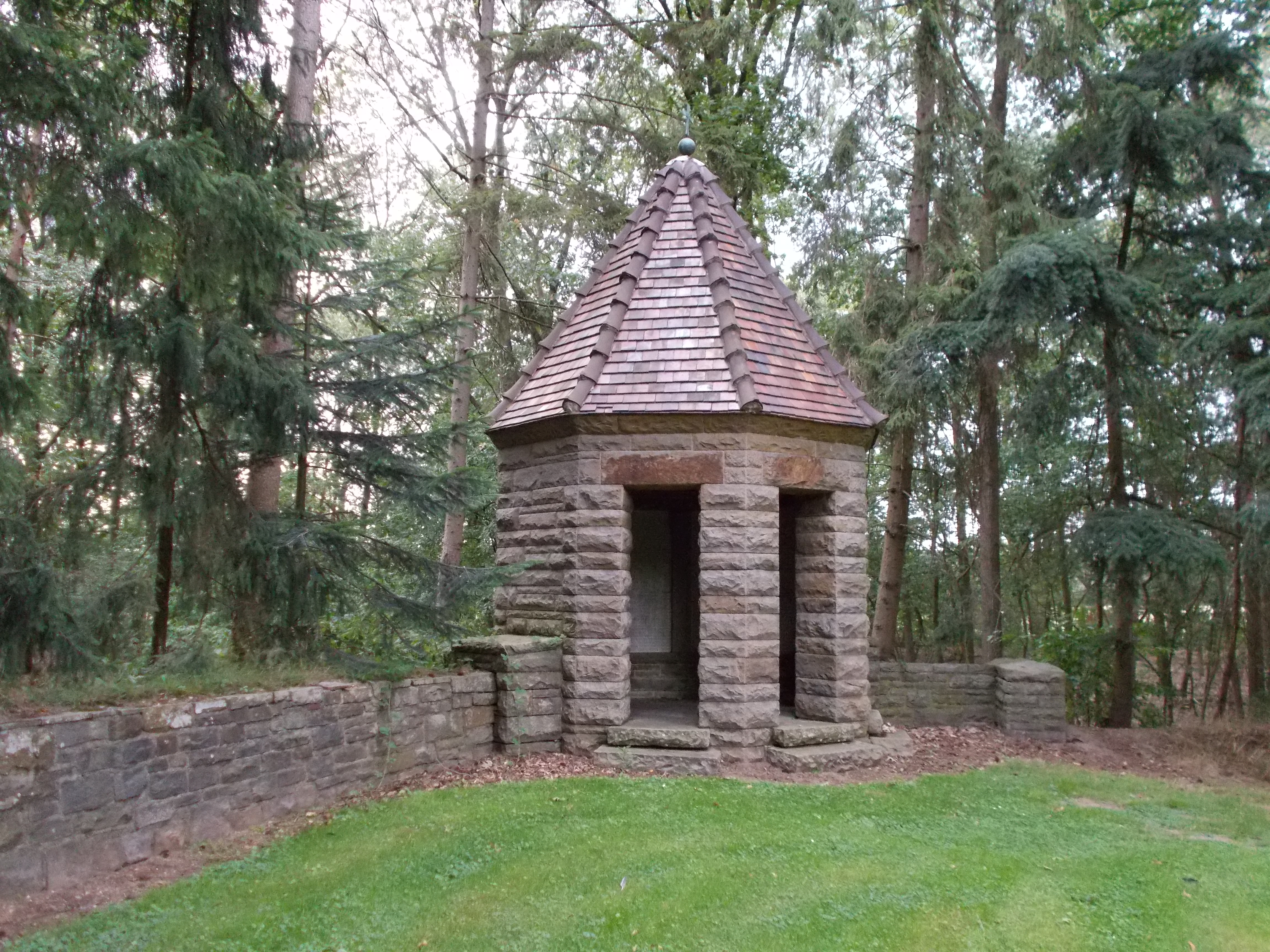 Achteckige Kappelle an der Friedhofsmauer. Im Inneren sind Gedenktafeln mit den Namen der Gefallenen von 1945.